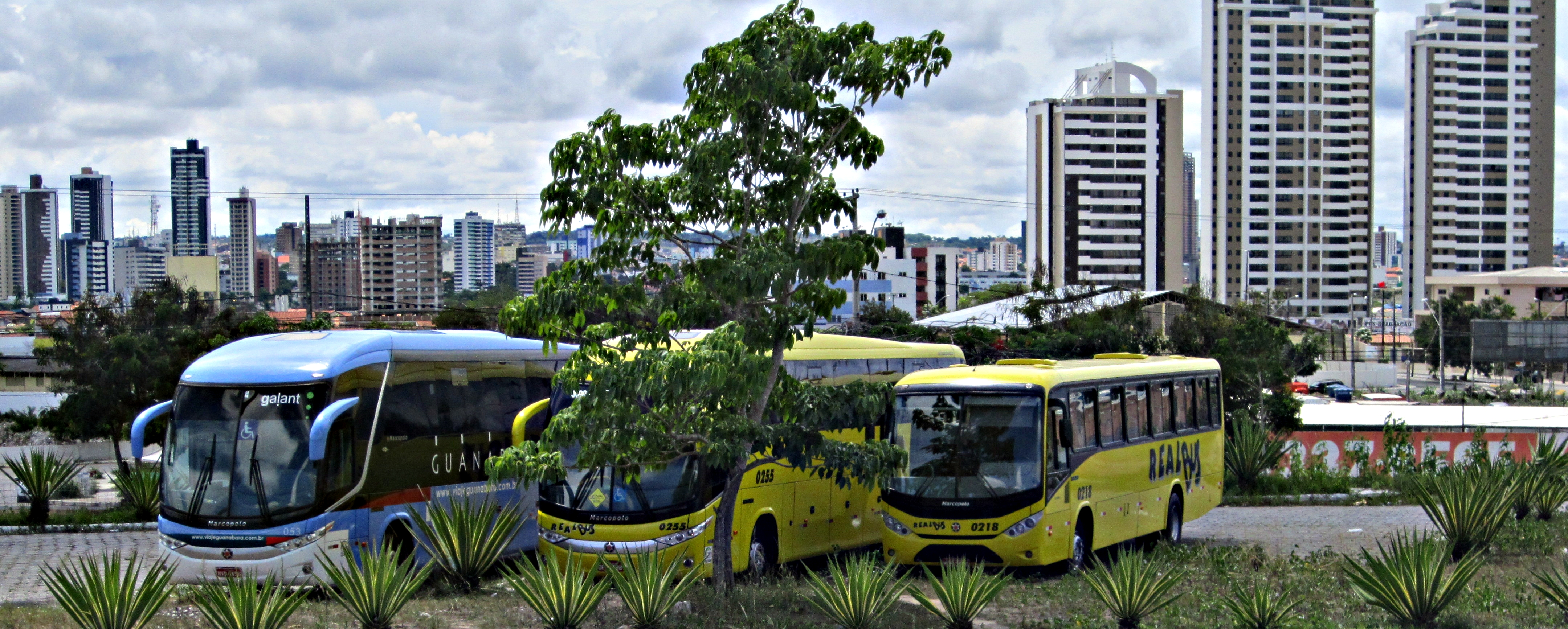 Pátio da Rodoviária de Campina Grande, Paraíba, Brasil.